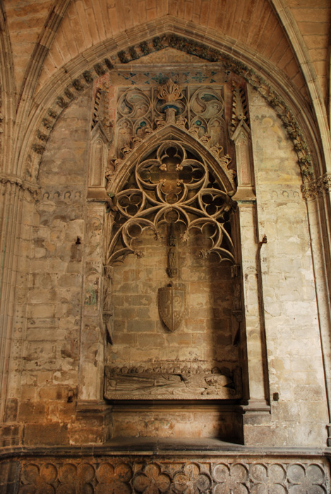 sepulcro asiain